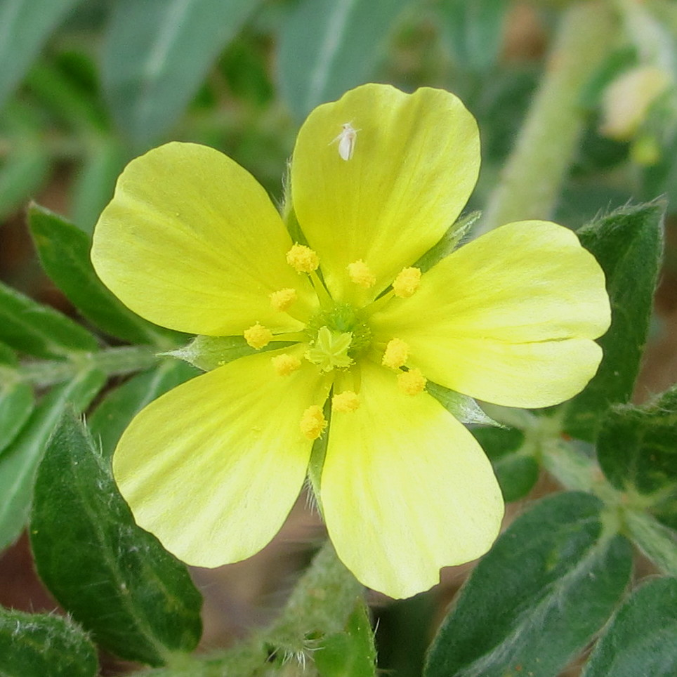 Tribullus terrestris